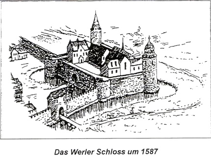 Schloss Werl, Kupferstich von 1587